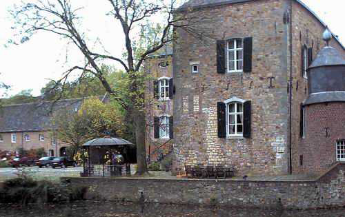 De afbeelding is een door mij gemaakte foto van Kasteel Erenstein.